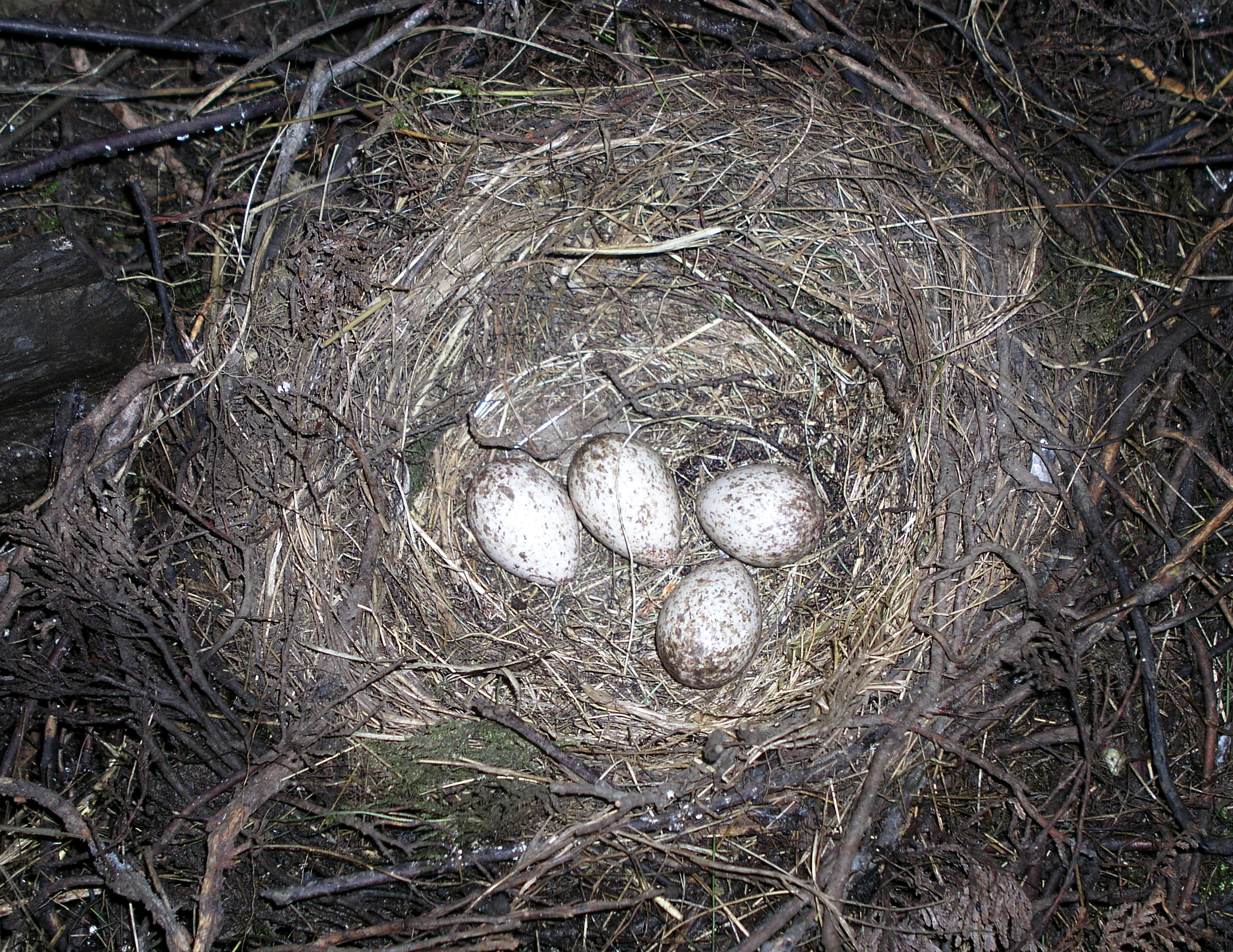 Nid dans le gouffre n° 3 du Col d'Aran, Bielle, Pyrénées-Atlantiques, France.